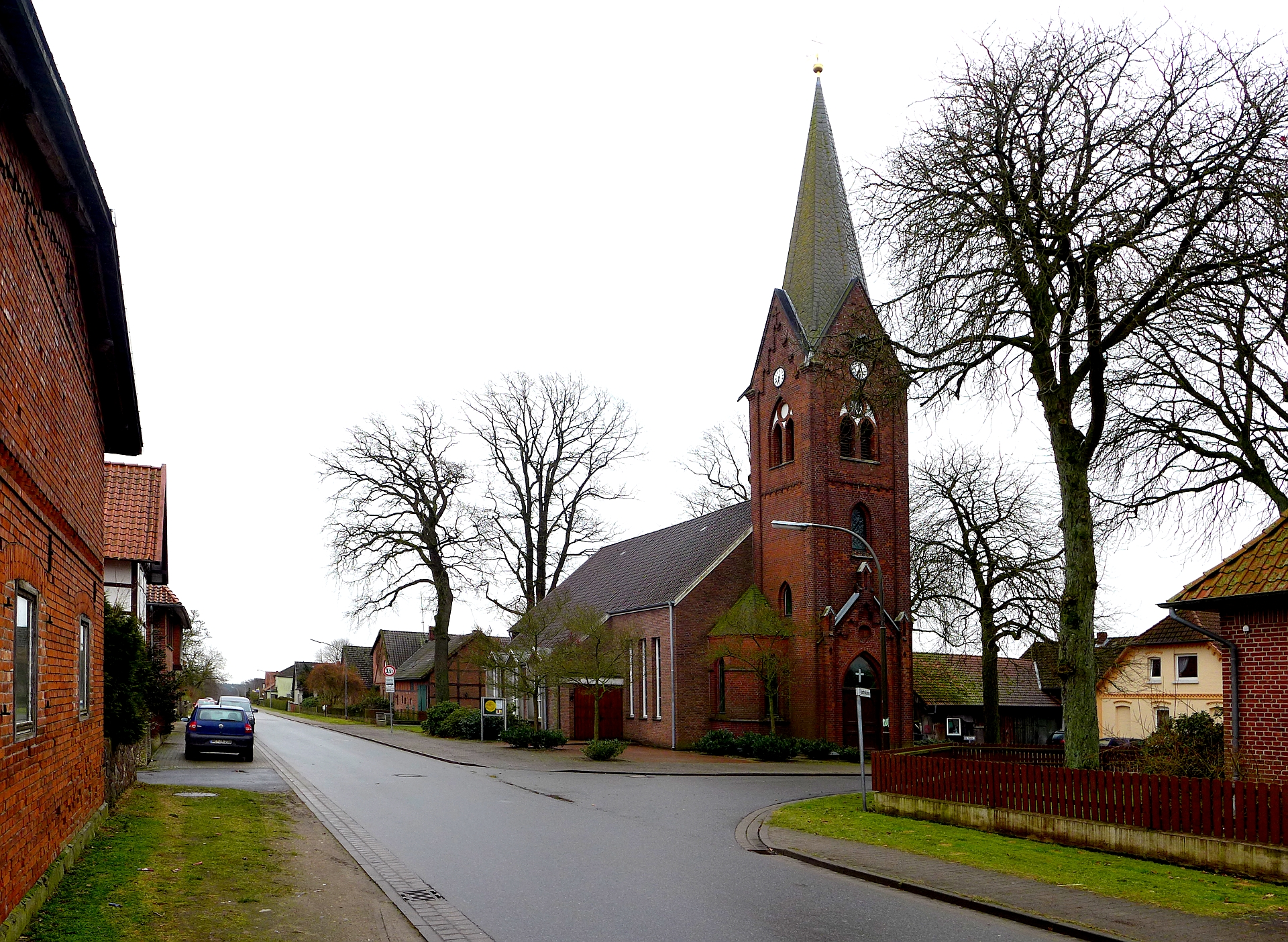 Kirche der Zionsgemeinde (SELK) in Klein Süsted, einem Ortsteil von Uelzen. Der Kirchturm ist ausgewiesen als Einzeldenkmal in Klein Süstedt. Aufnahmedatum 2016-01.